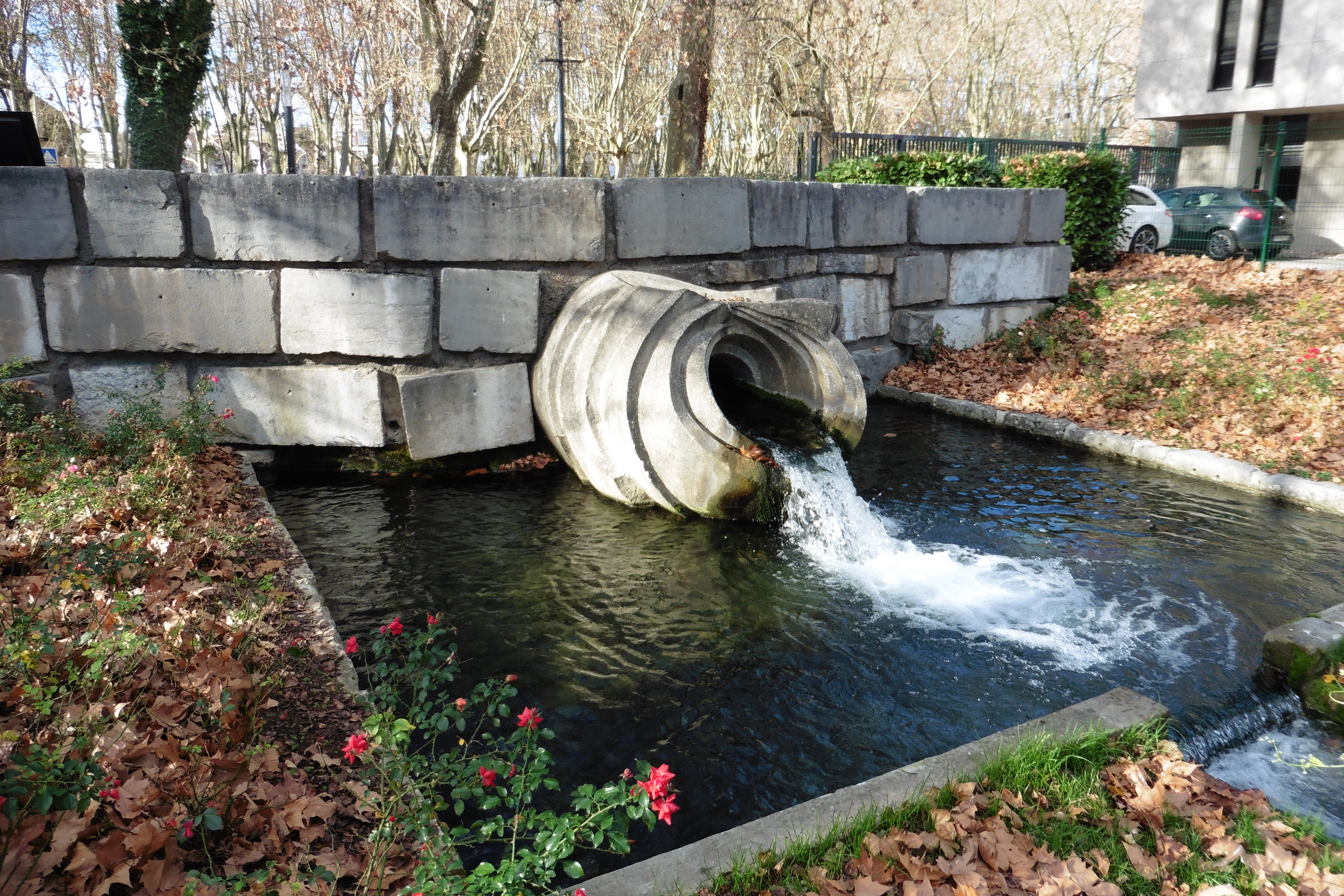 Fontaine